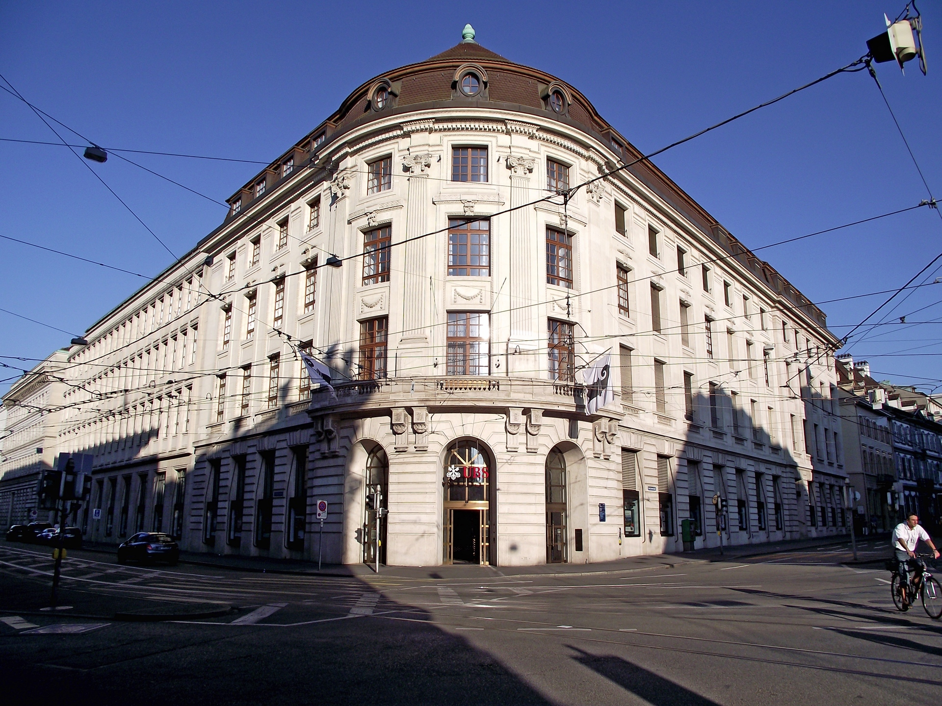 瑞银集团巴塞尔总部